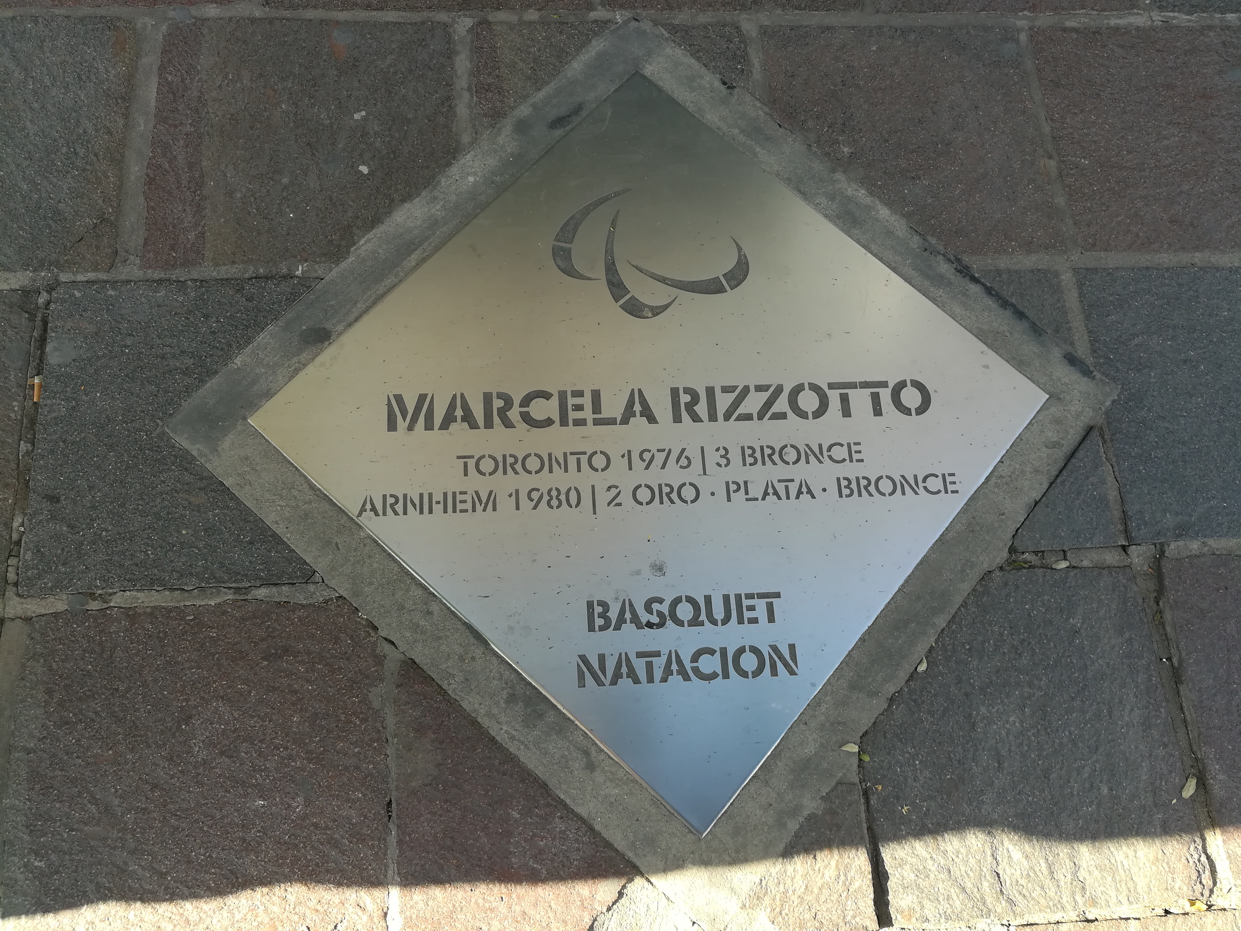 Paseo de los Olímpicos de los en la Avenida Pellegrini (Rosario).